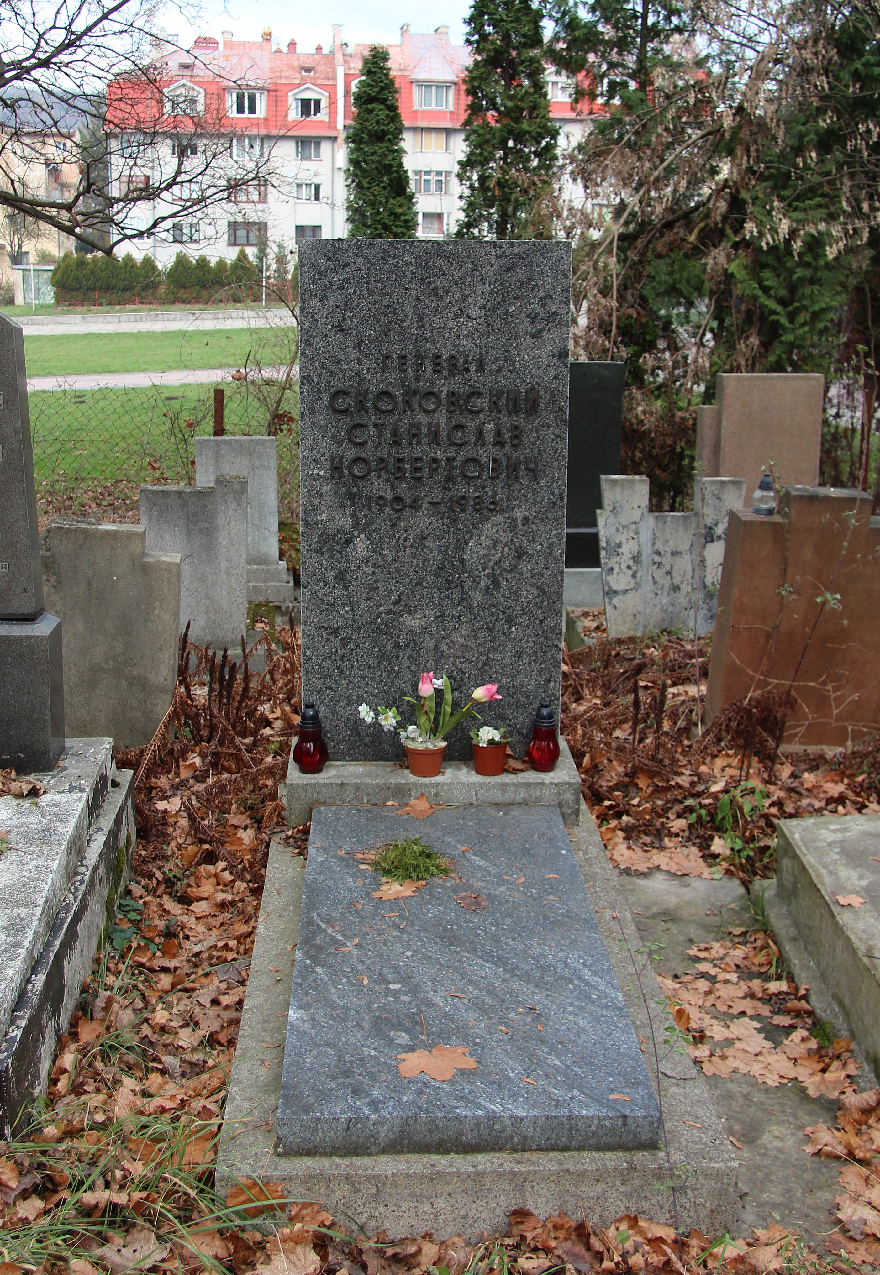 Могила Ст. Скоковського. Личаківський цвинтар , поле № 86.